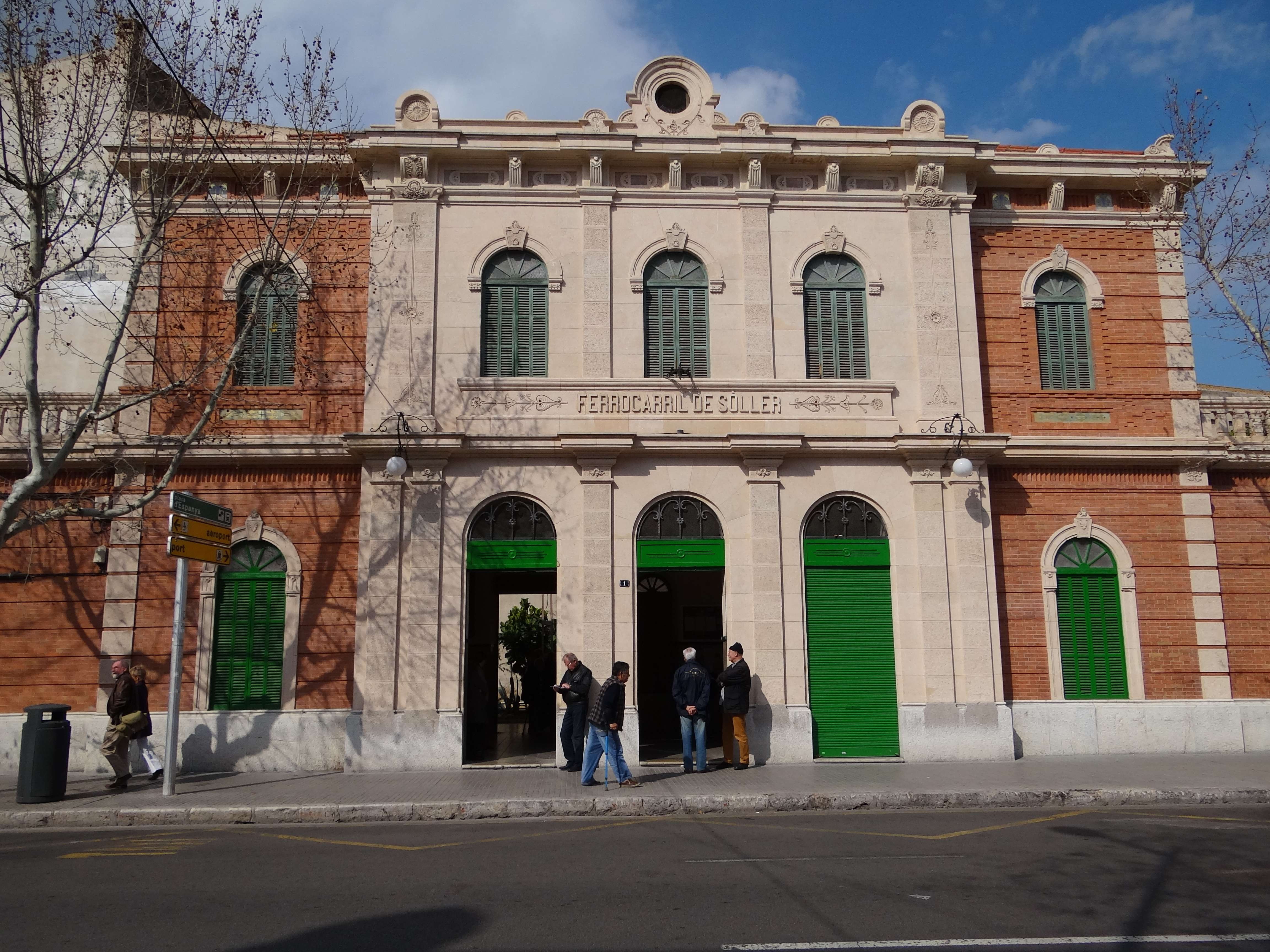 Arxiduc, Palma, Illes Balears, Spain